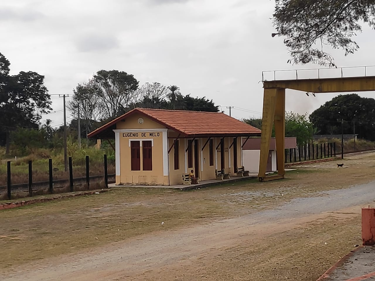 Estação abandonada Localizada em São José dos Campos, distrito de Eugênio de Melo, pertencente à extinta ferrovia Central do Brasil. Prédio tombado pelo patrimônio histórico